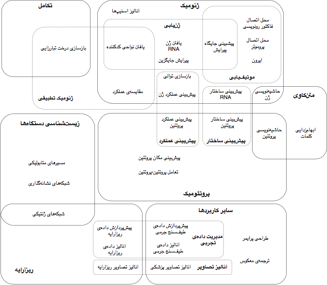 کاربرد روش‌های یادگیری ماشین در بیوانفورماتیک